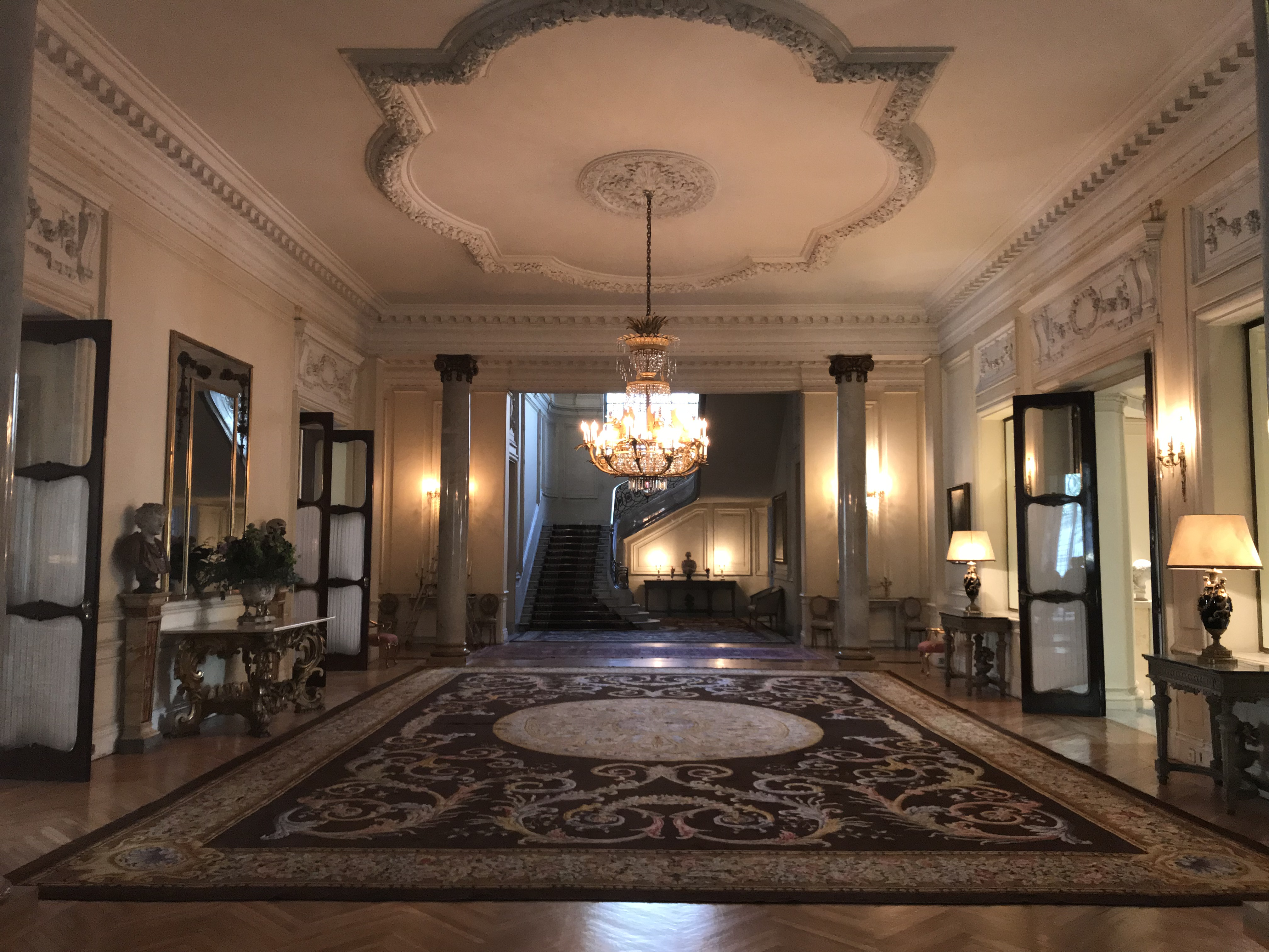 Embajada de Italia en Madrid. Visita en el marco del proyecto Open House Madrid 2017.